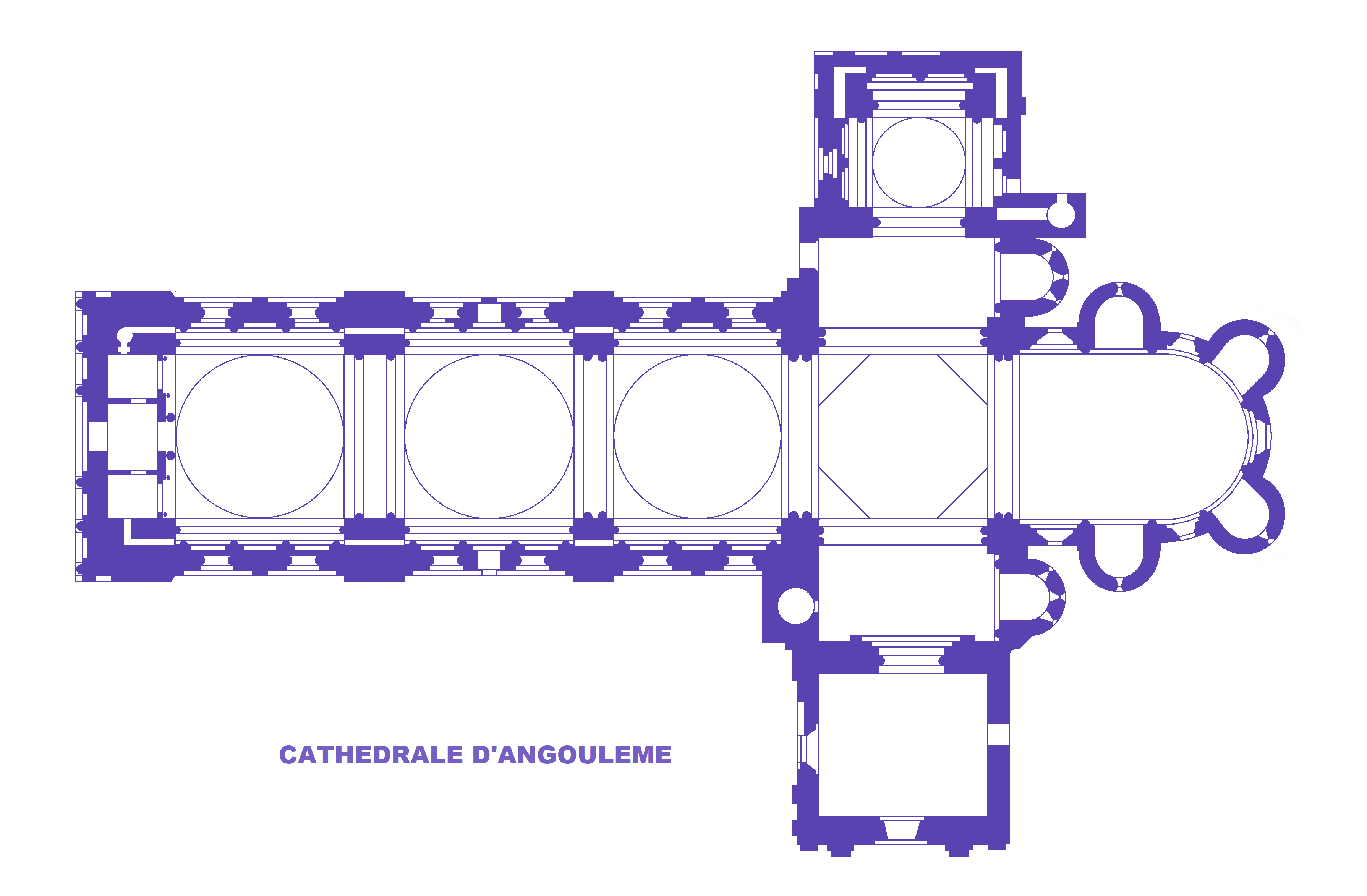 Cathédrale d'Angoulème, Plan